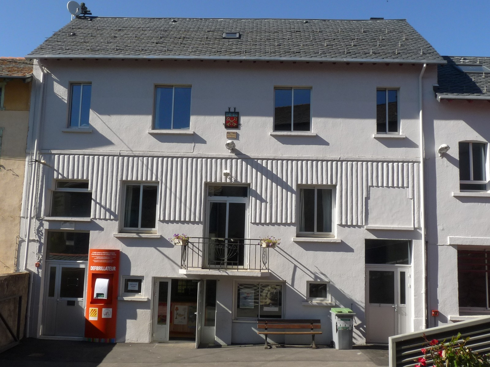 Ecole de St-Pierre-dels-Forcats, Pyrénées-Orientales, France